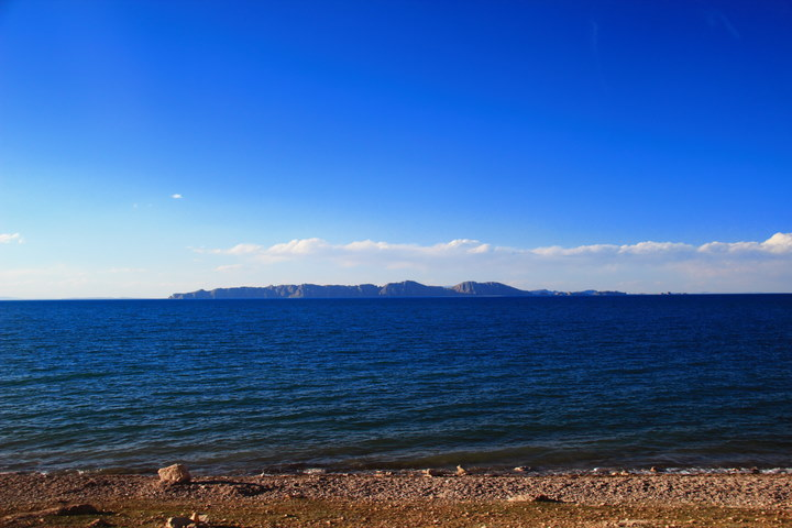 西藏自治区色林错